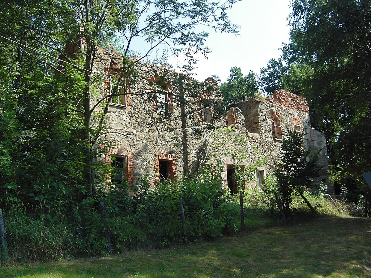 Torzo fary, Lipová (2006)